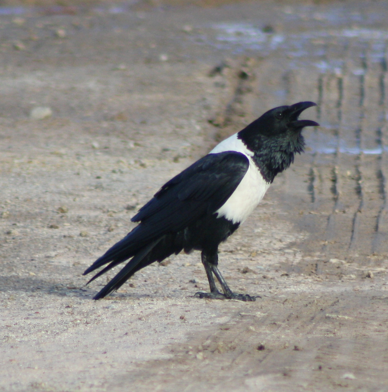 Pied Crow